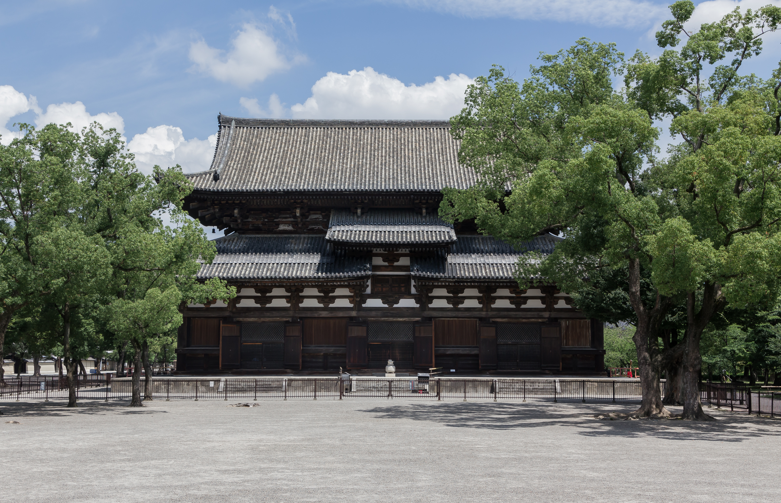 東寺、金堂（国宝）